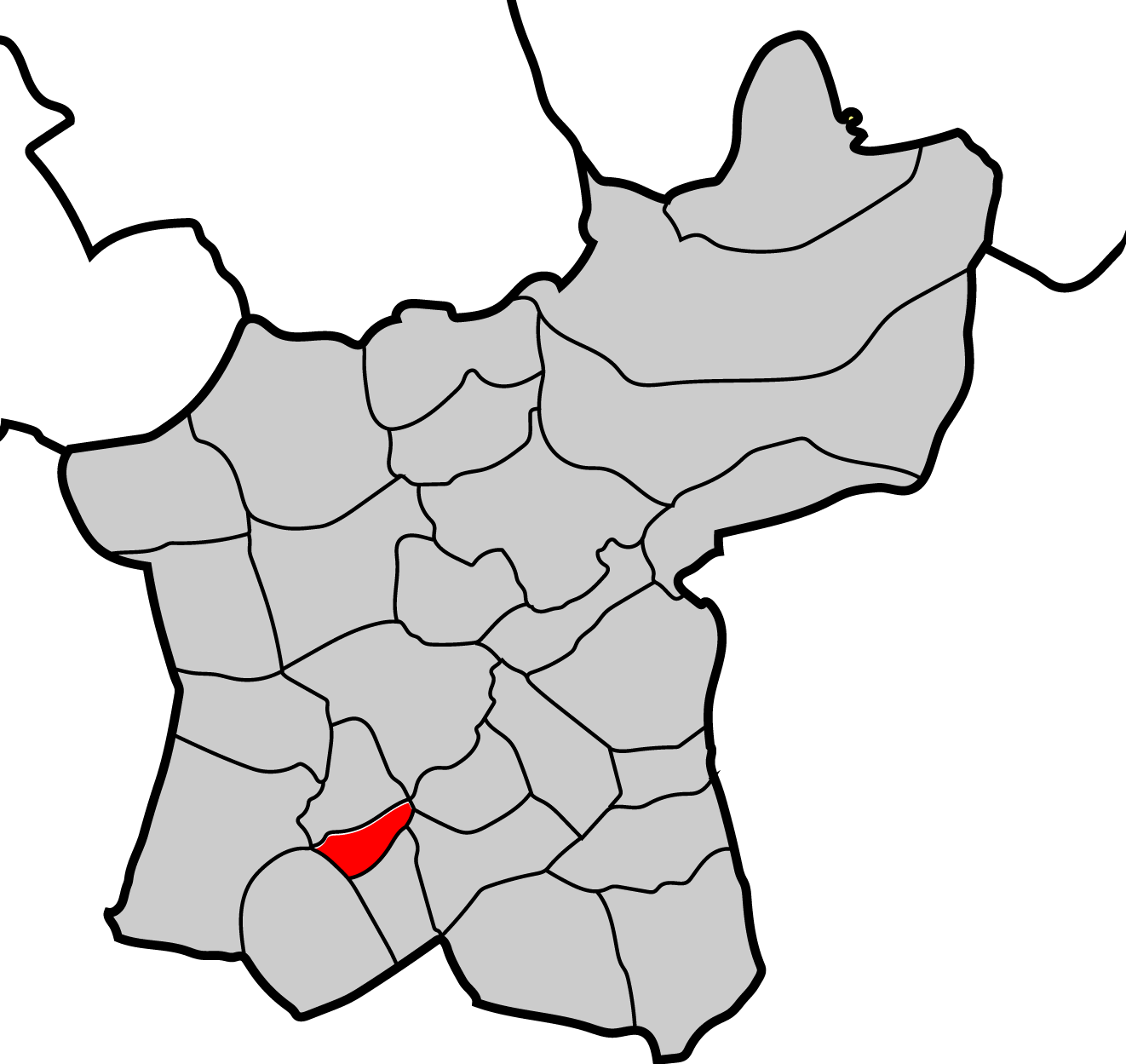 Mapa parroquia de Laxes Baralla